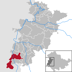 Geisa in Thuringia - Wartburgkreis